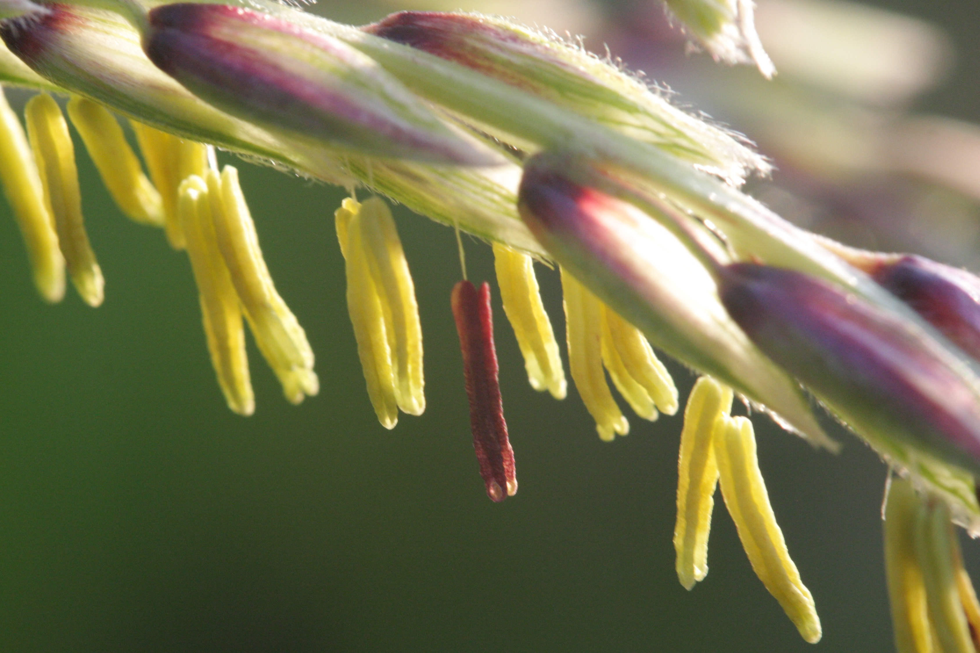 Männliche Blüte einer Maispflanze